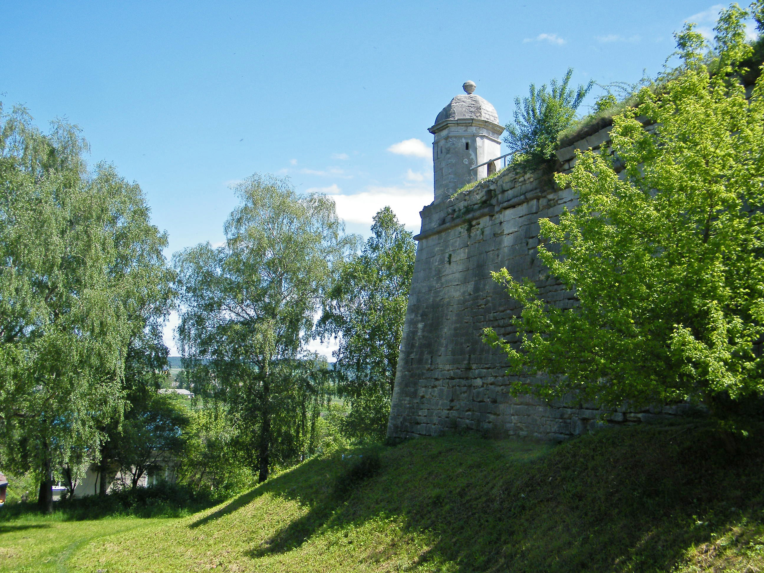 Zamek w Złoczowie na Ukrainie - dawna twierdza RON na obszarze historycznego województwa ruskiego. Kolejno własność Sienieńskich, Zborowskich, Górków, Sobieskich, Radziwiłłów i Komarnickich